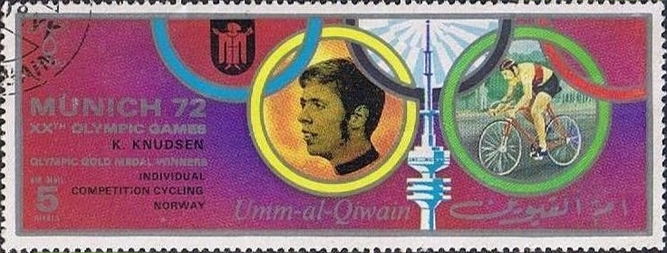 Knut Knudsen